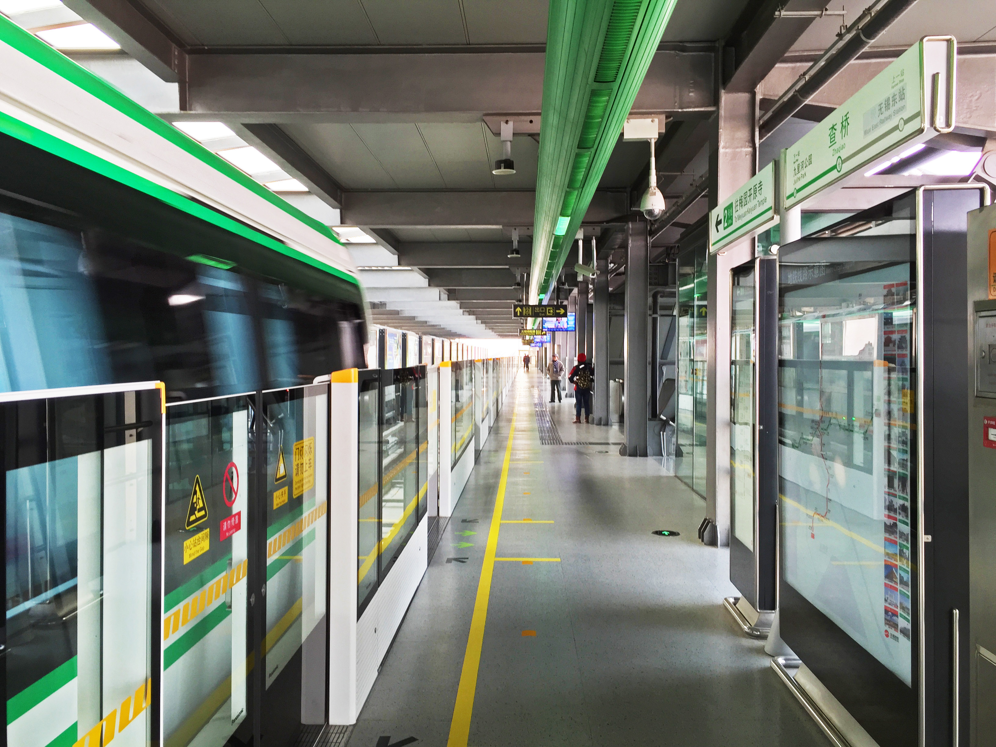 无锡地铁查桥站站台